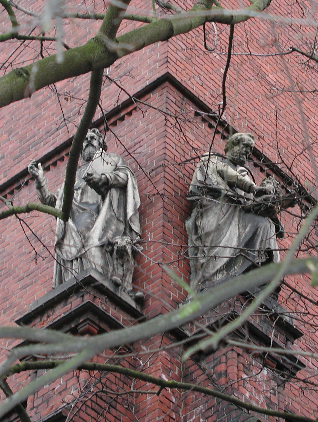 Skulptur am Turm der Immanuelkirche